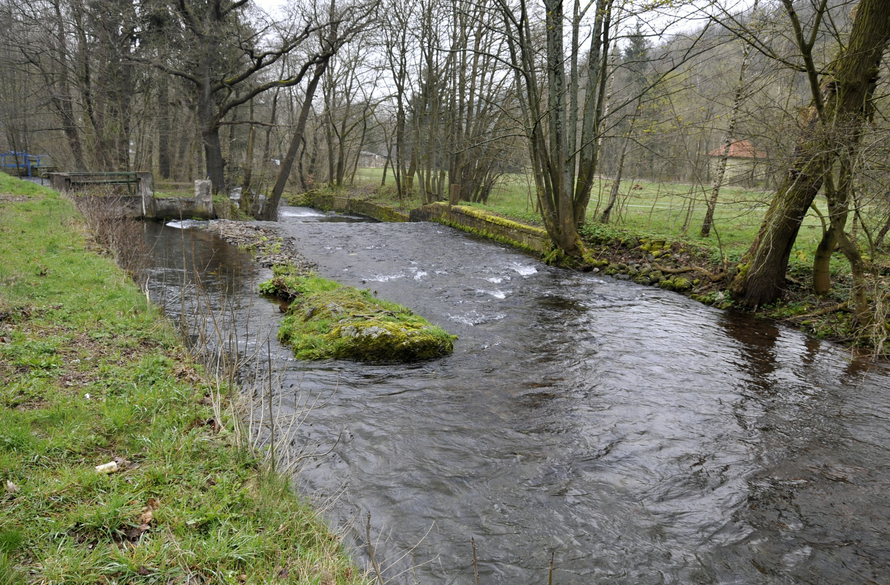 Apfelstädt-Fluss, am Wehr zur Abtrennung des Flößgrabens bei Georgenthal